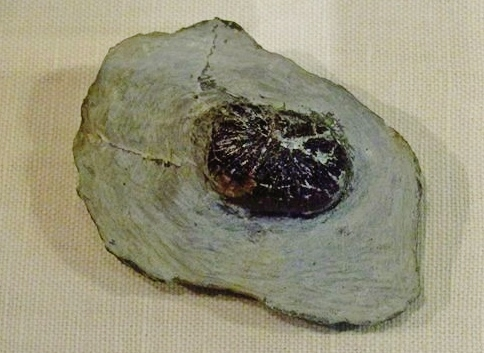 Fossil of Tholodus, an extinct reptile - Muschelkalkmuseum Hagdorn